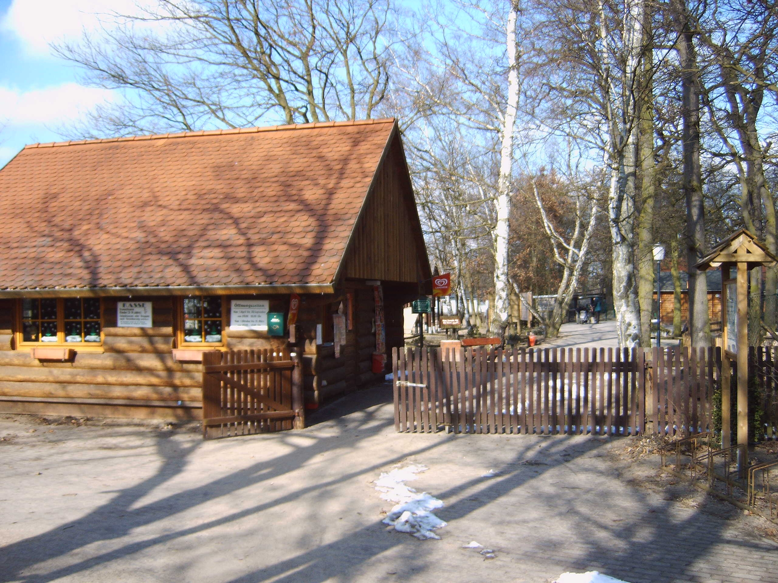 Eingang zum Wildpark Weißewarte, Weißewarte, Altmark, Deutschland Bild aufgenommen am 5.3.2006 durch Olaf Meister